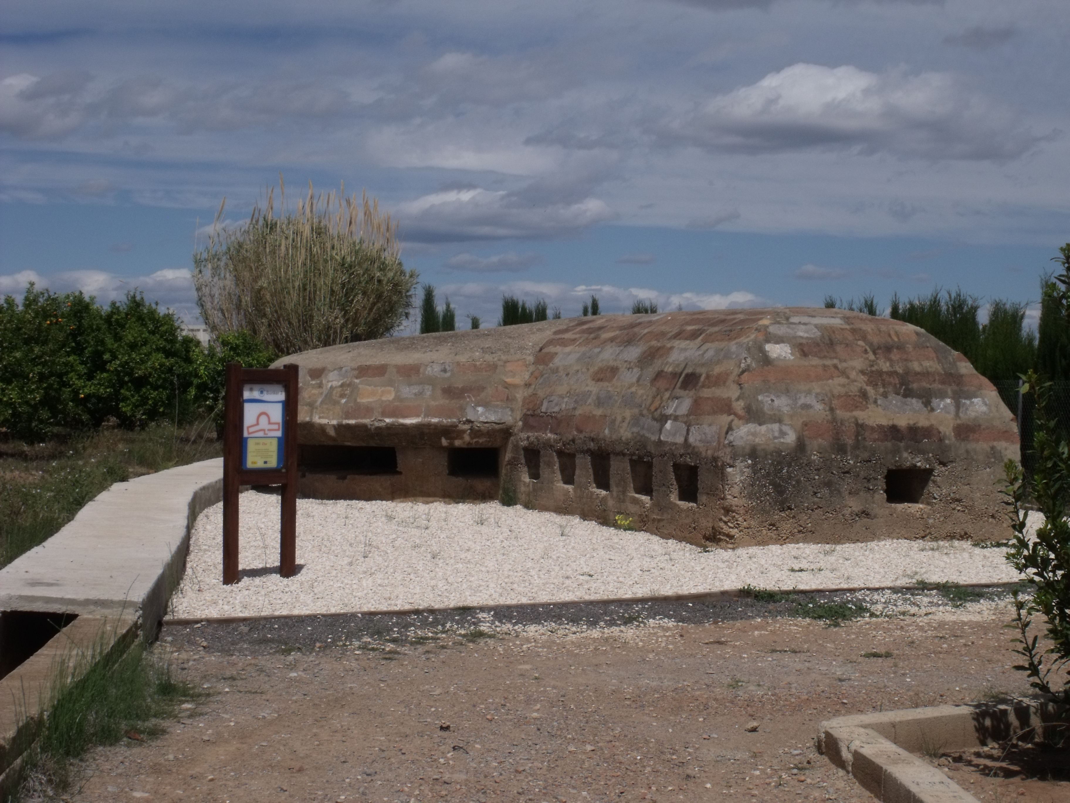 Vista general.